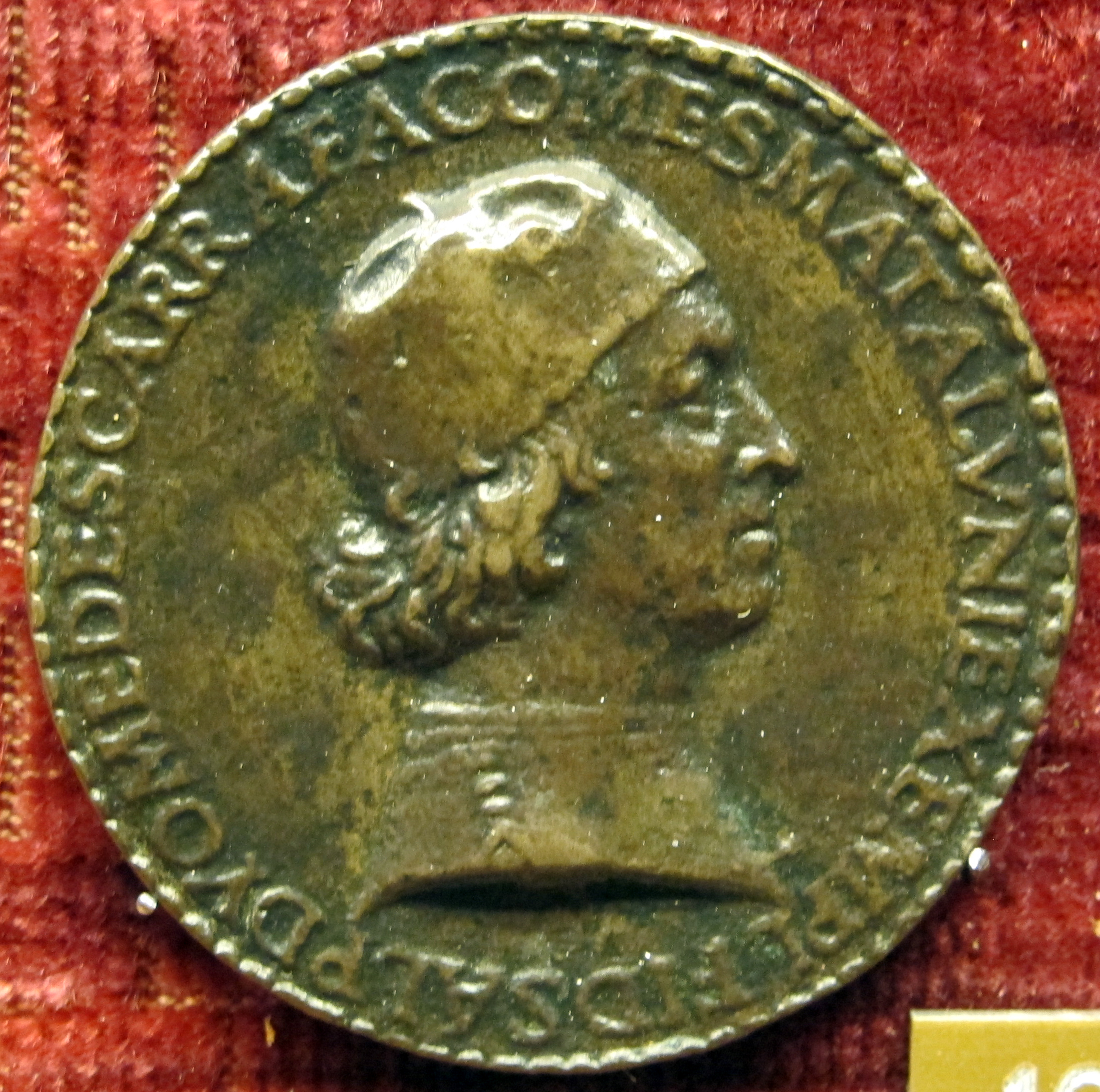 Medaglia di Diomede Carafa, primo conte di Maddaloni (1406-1487)